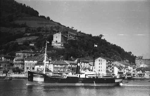 Baporea Pasaiako portutik ateratzen. 1943-06-30